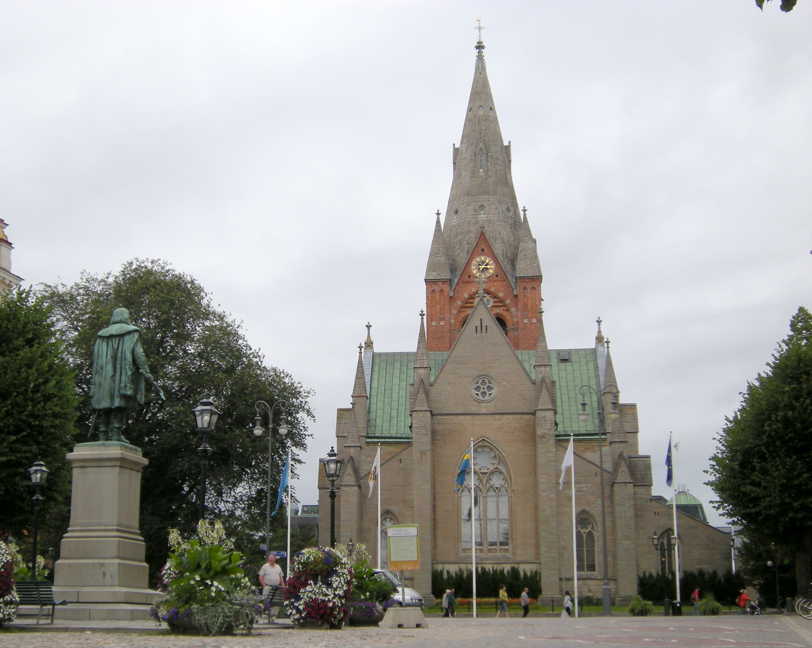 Örebro Sankt Nikolai kyrka och staty av Engelbrekt.